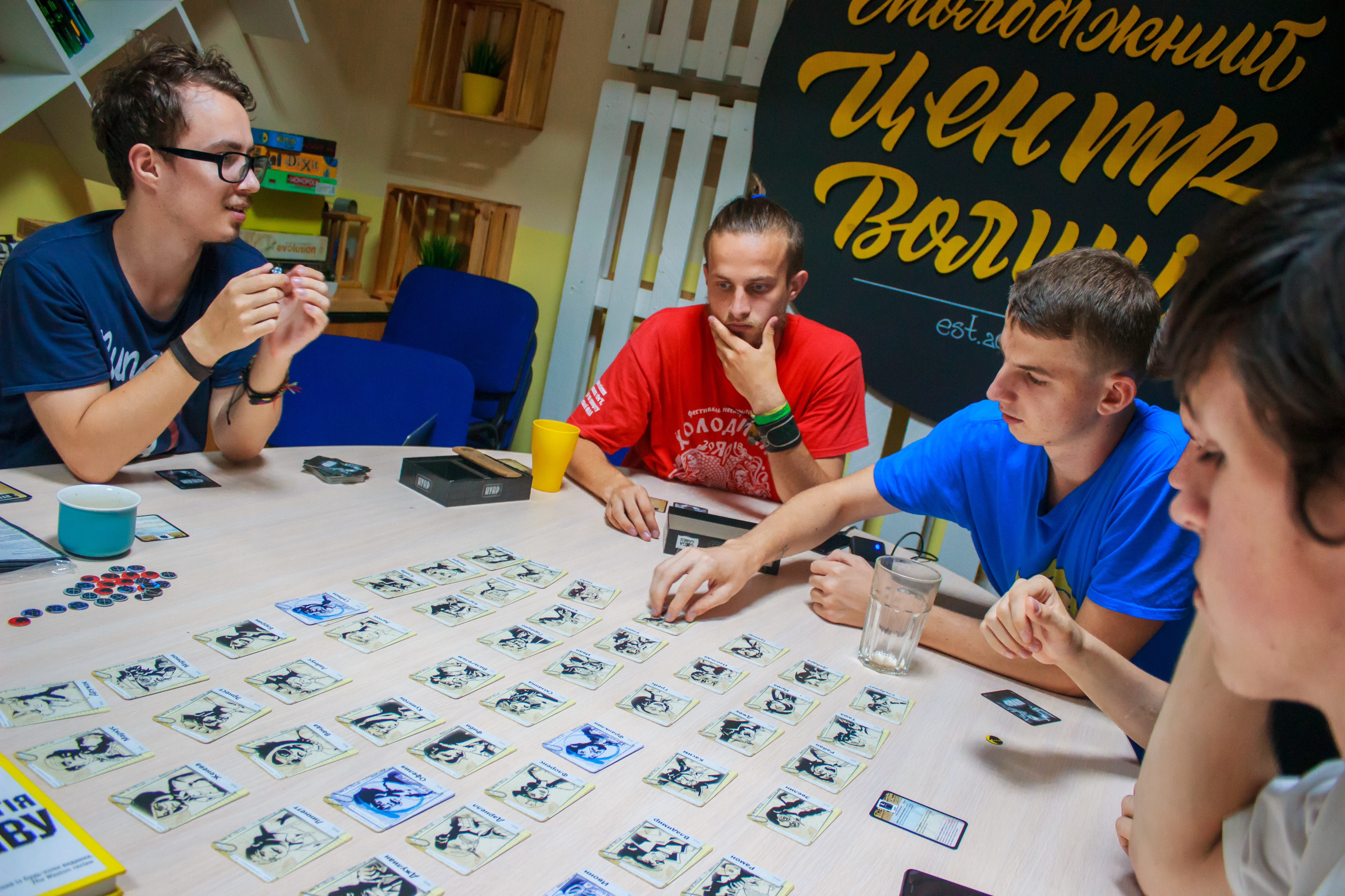 мала кімната